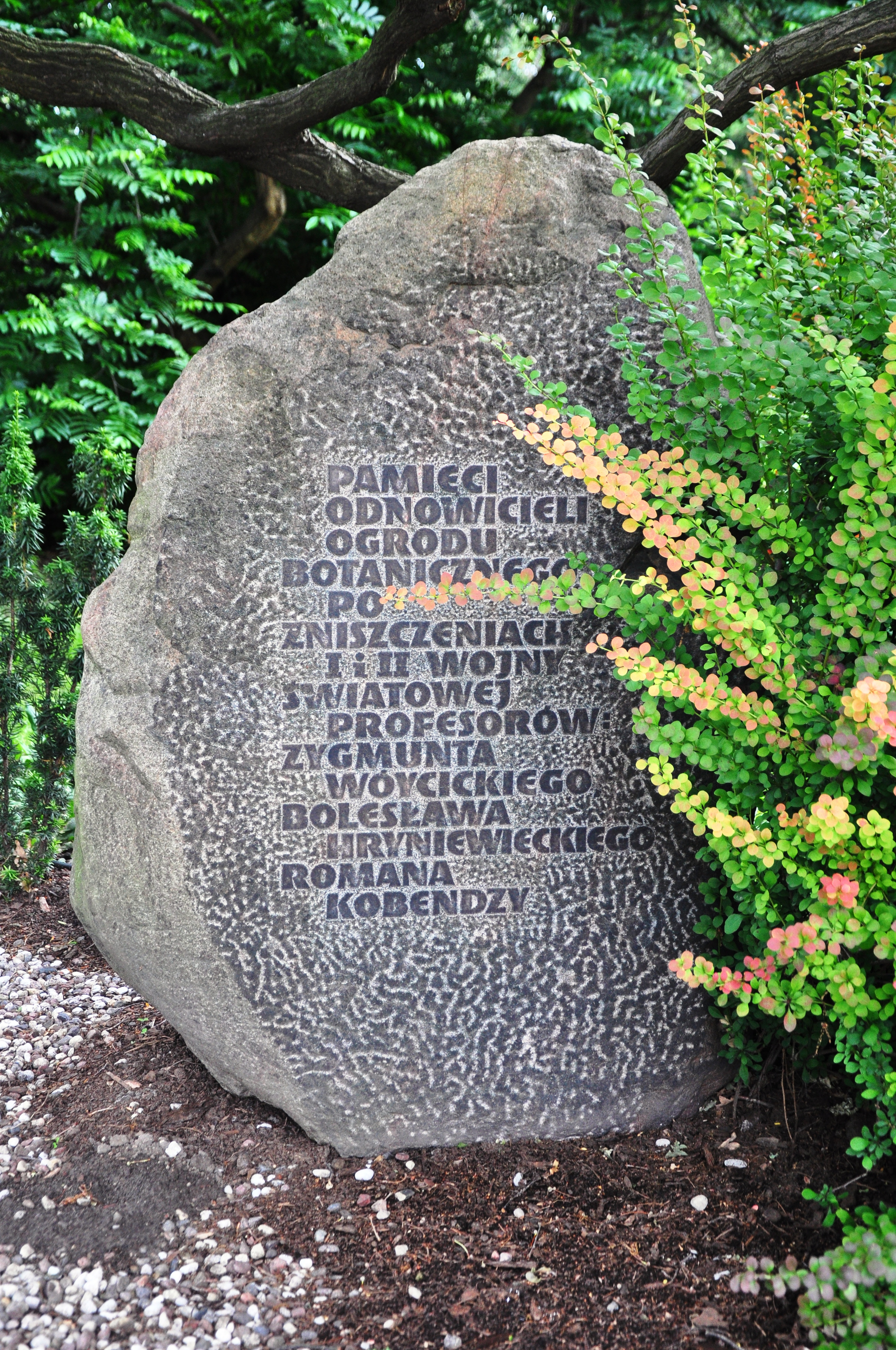 Warschau